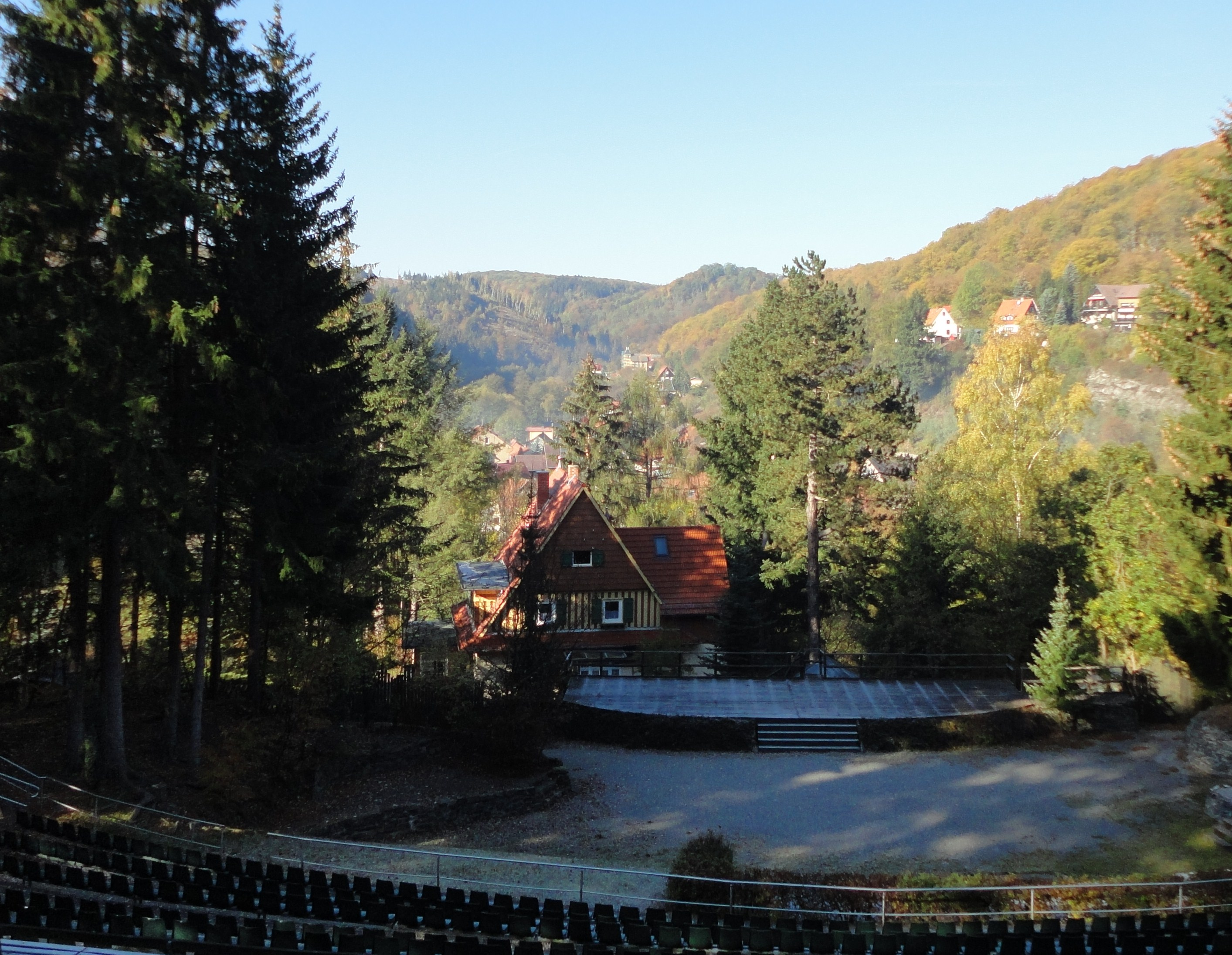 Altenbrak, Waldbühne